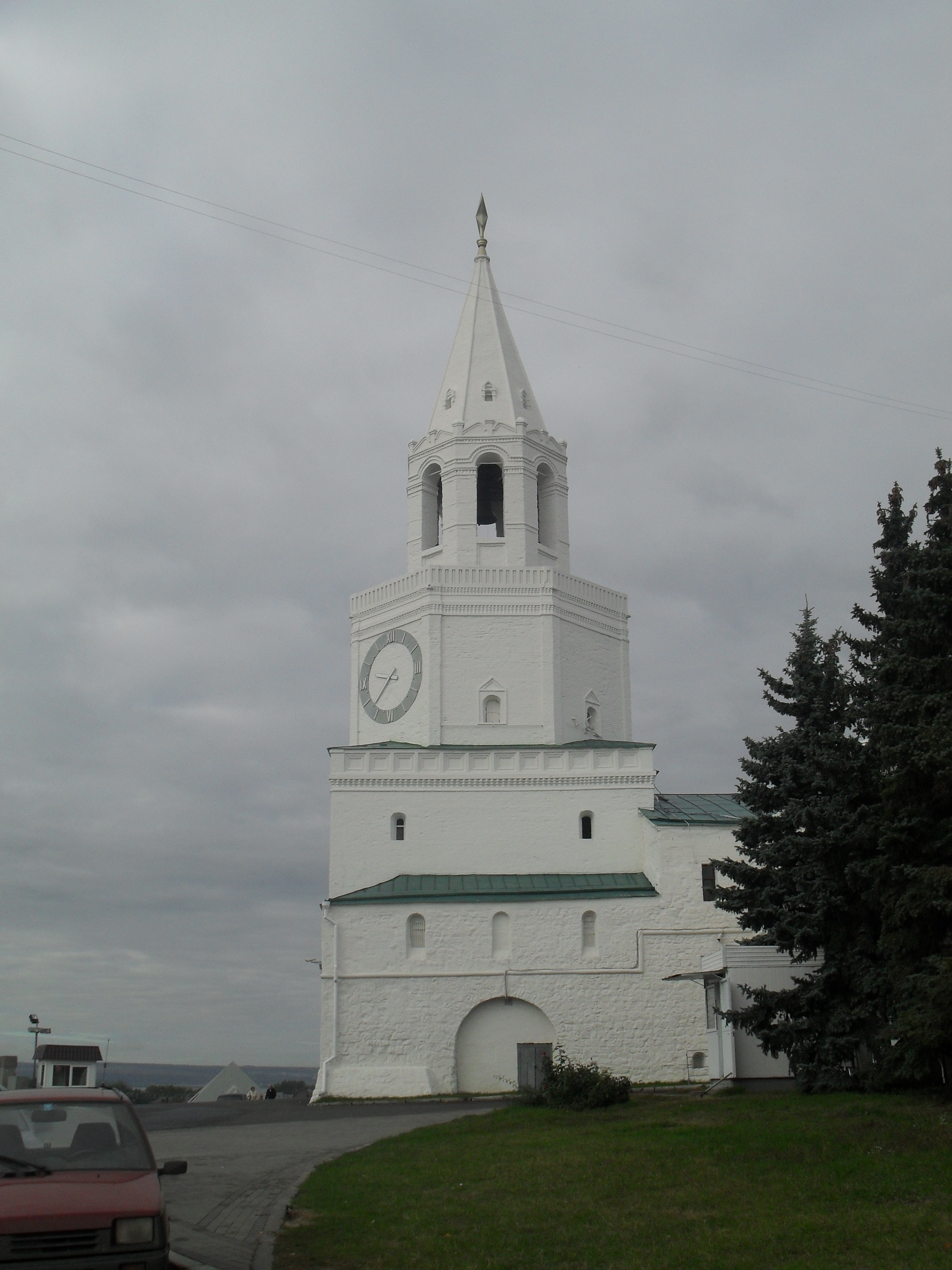 Спасская башня Казанского кремля